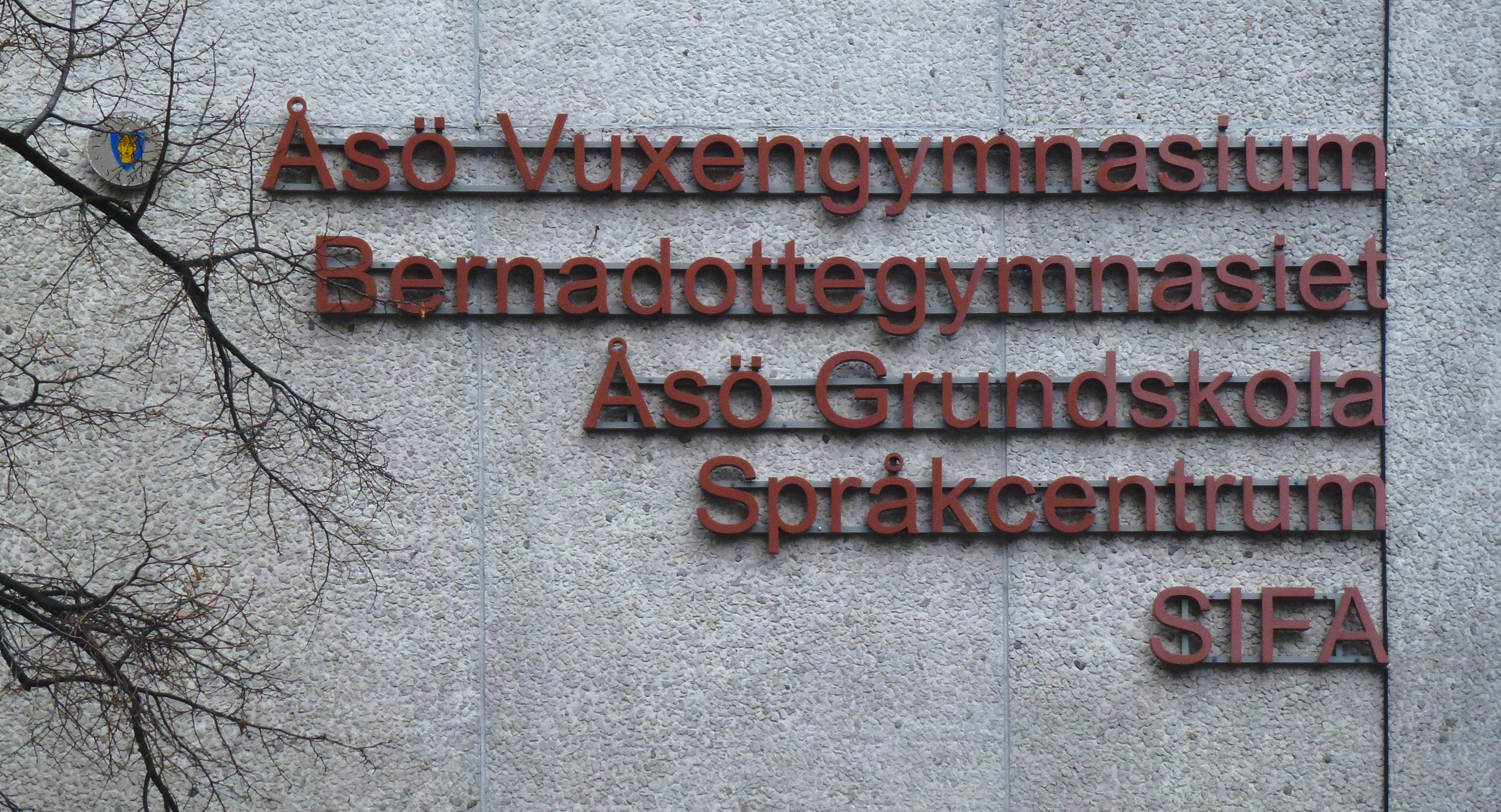 Åsö gymnasium, arkitekt Paul Hedqvist